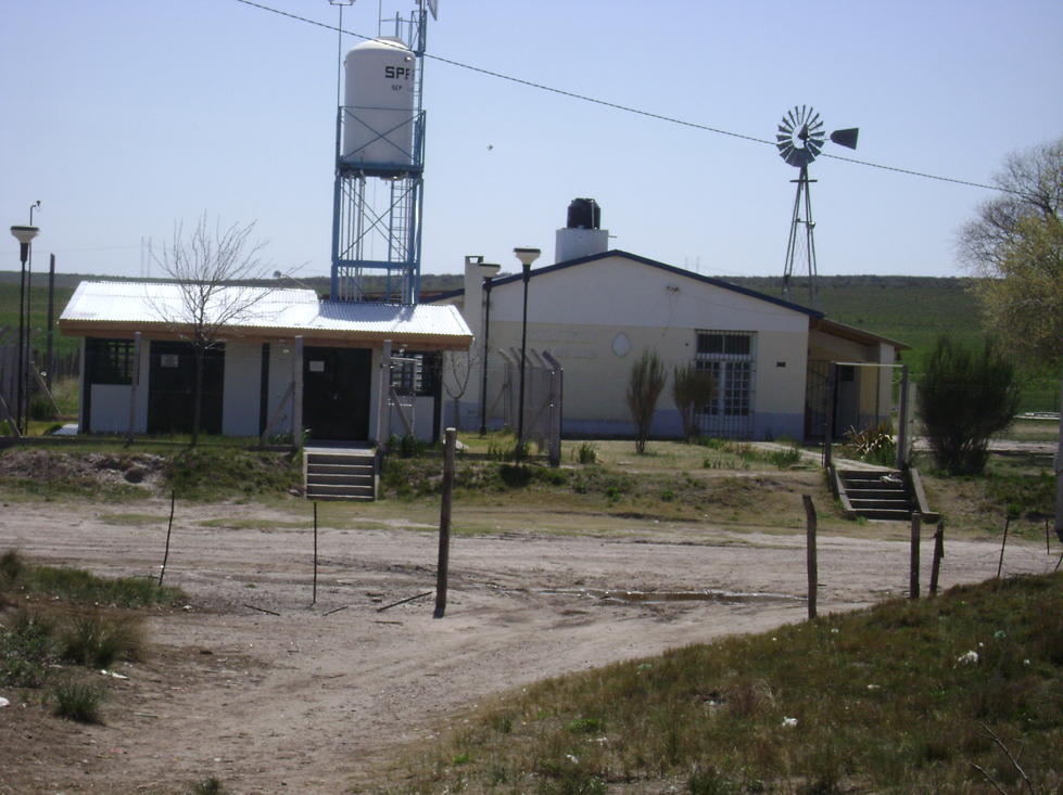 Escuela Rural N° 41